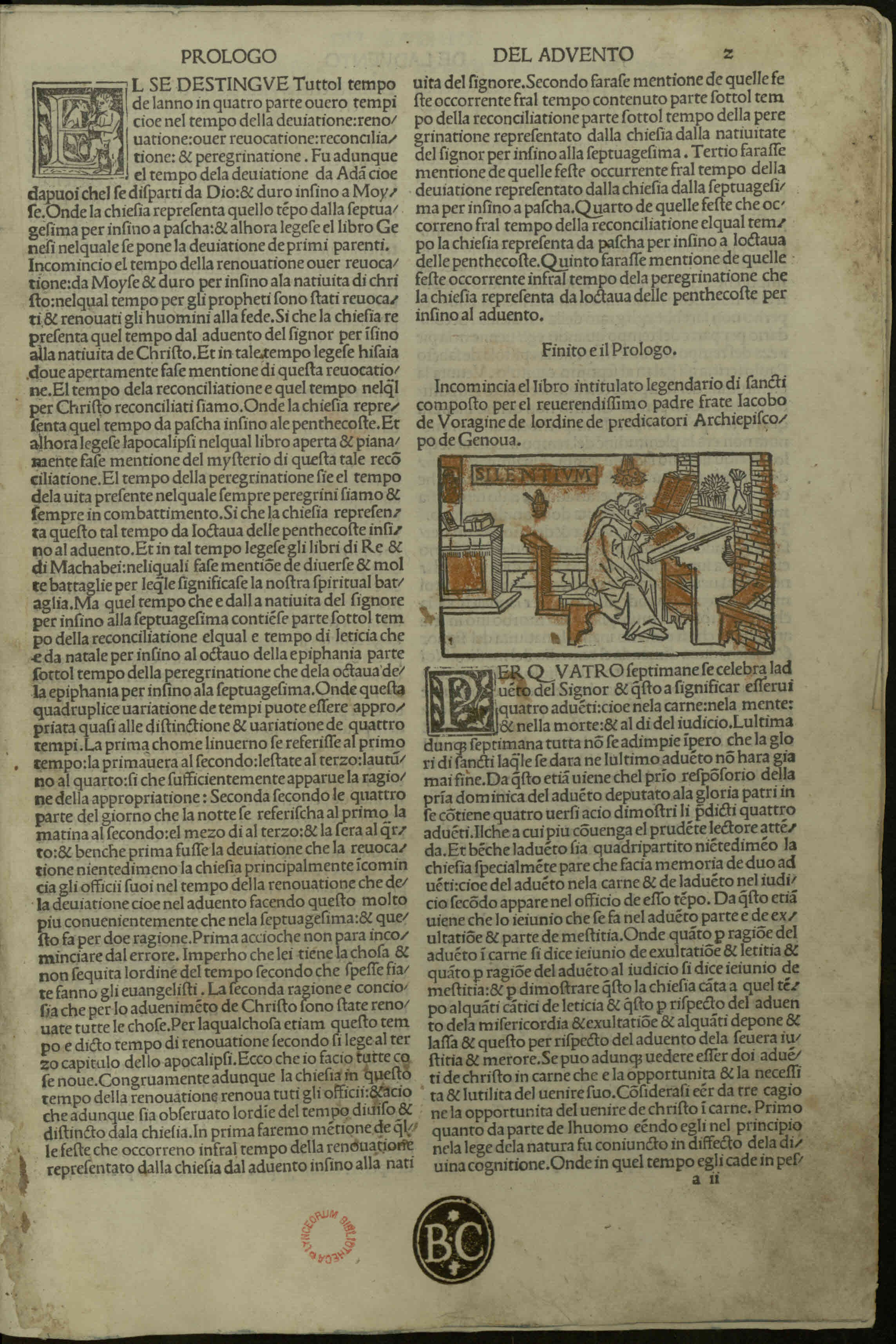 Legenda aurea (italiano). - Stampate in Venetia : per Bartholomeo di Zani da Portese, nel MCCCCLXXXXIX adi V di decembre. - 240 c. ; a-z⁸, &⁸, [us]⁸[rum]⁸, A-D⁸ ; fol. - Dall'analisi dell'esemplare sembra mancare la c. c8. Errori nella cartulazione manoscritta .